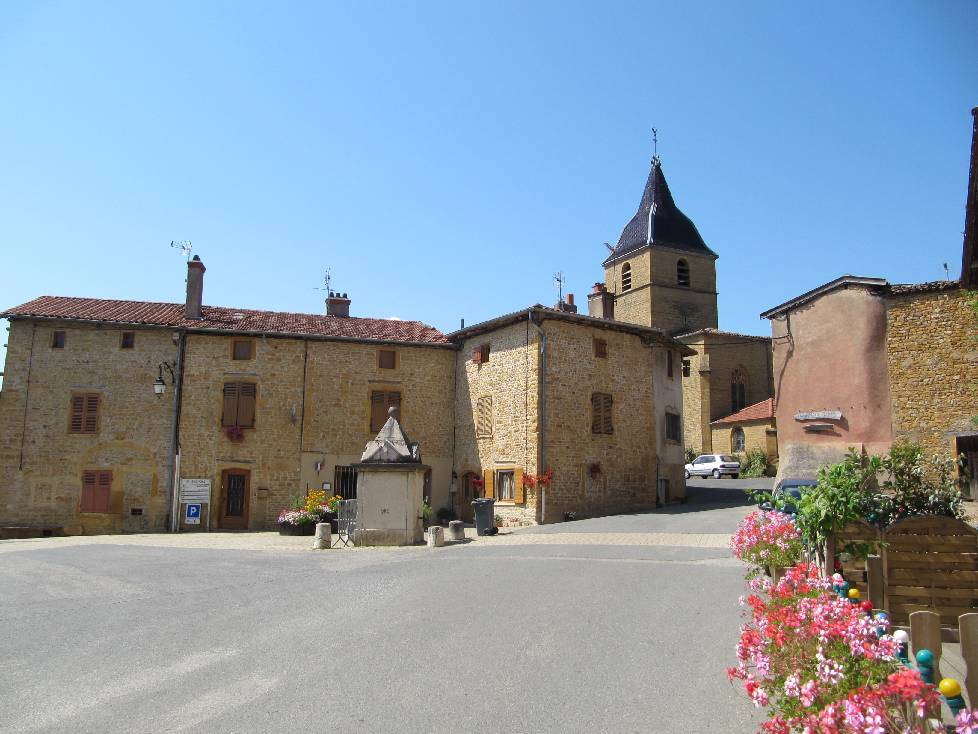 Bagnols (Rhône)